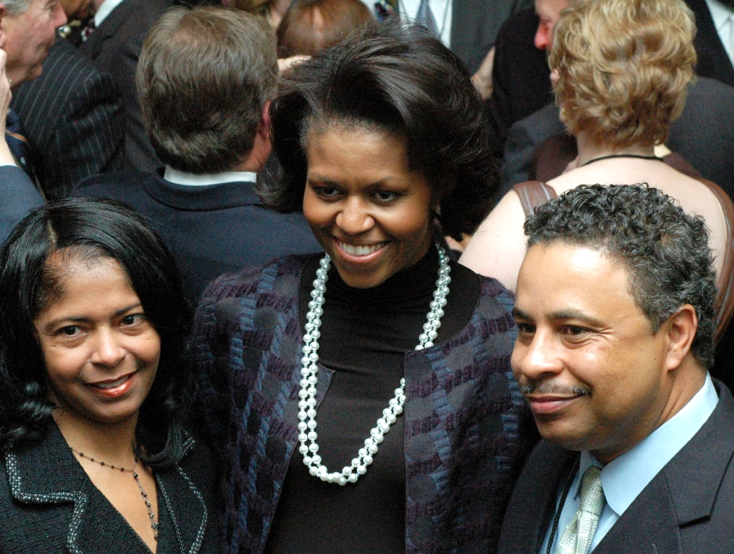 Michelle Obama